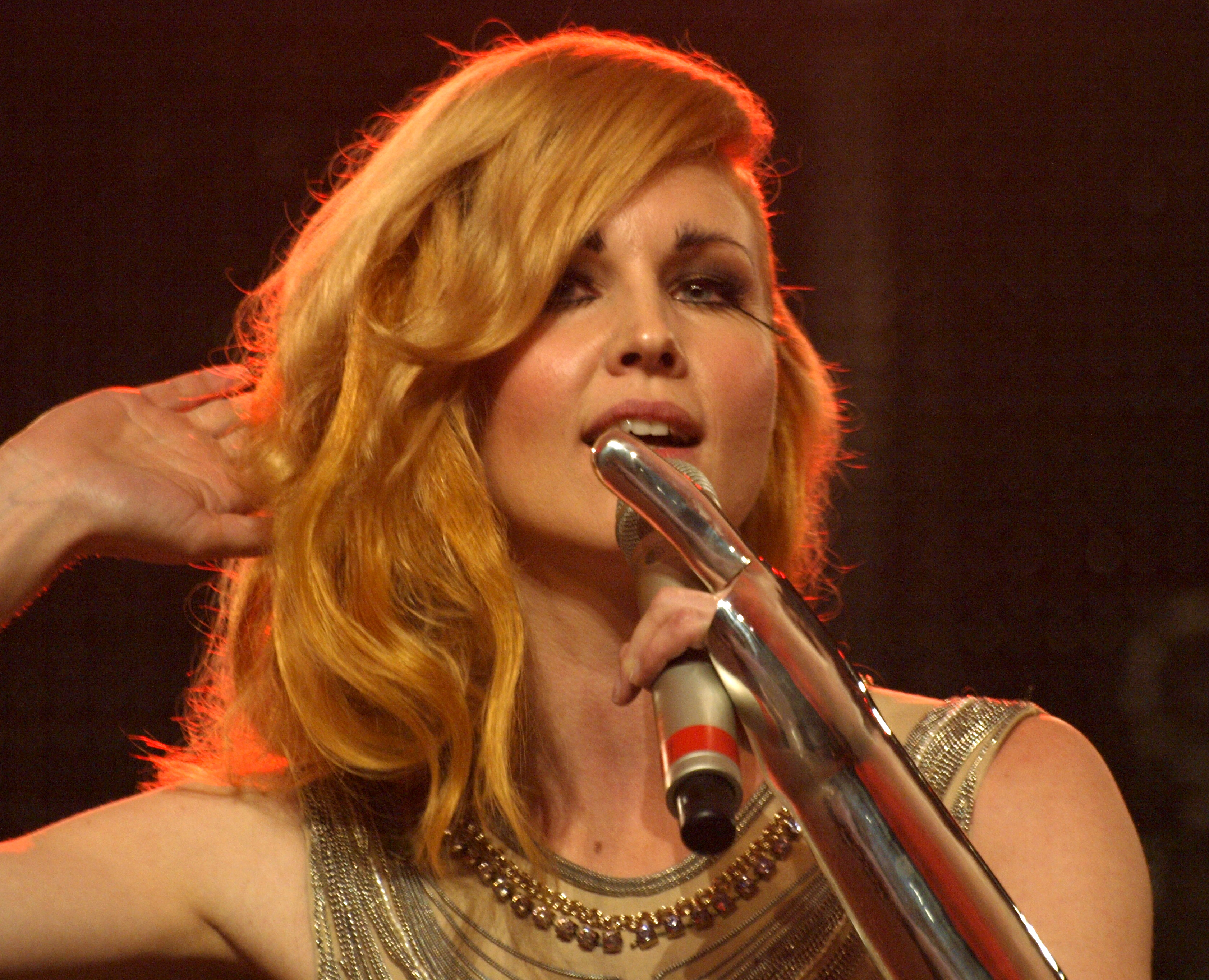 Jenny Silver at Stockholm Pride 2010.